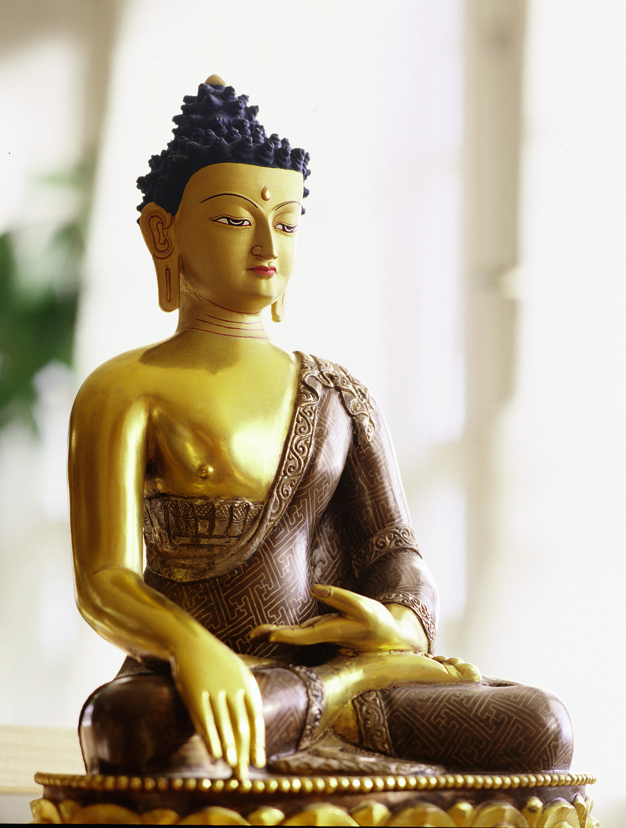 Buddha Shakyamuni